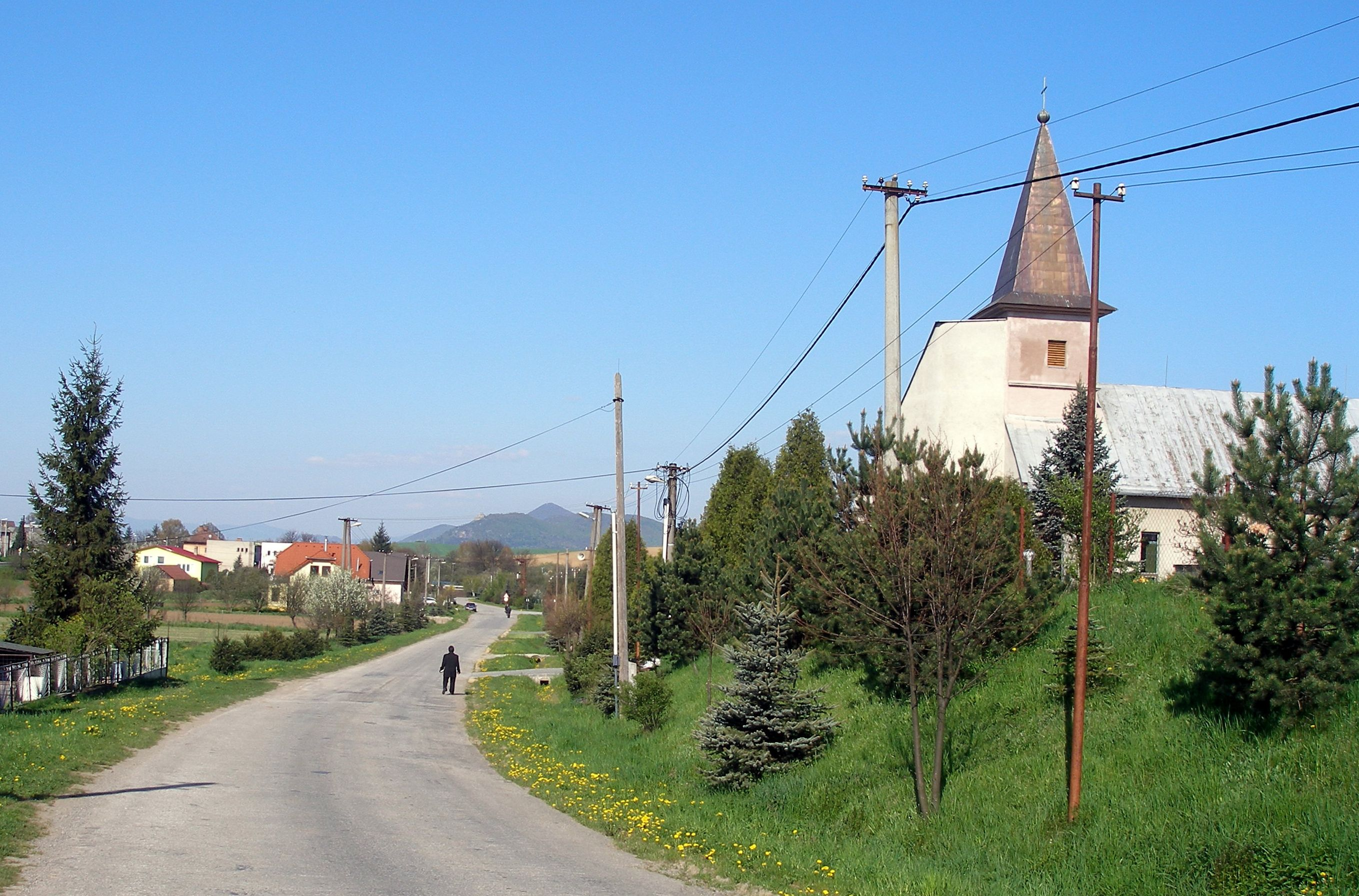 Obec Lipníky okres Prešov región Šariš